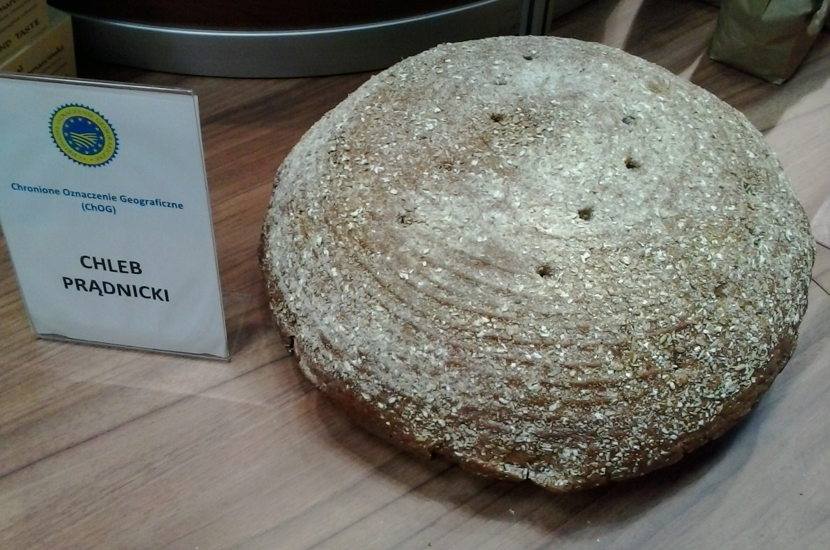 Chleb prądnicki na targach Smaki Regionów w Poznaniu - 2014r.